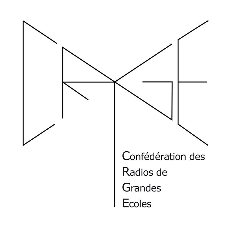 Confédération des Radios de Grandes Ecoles